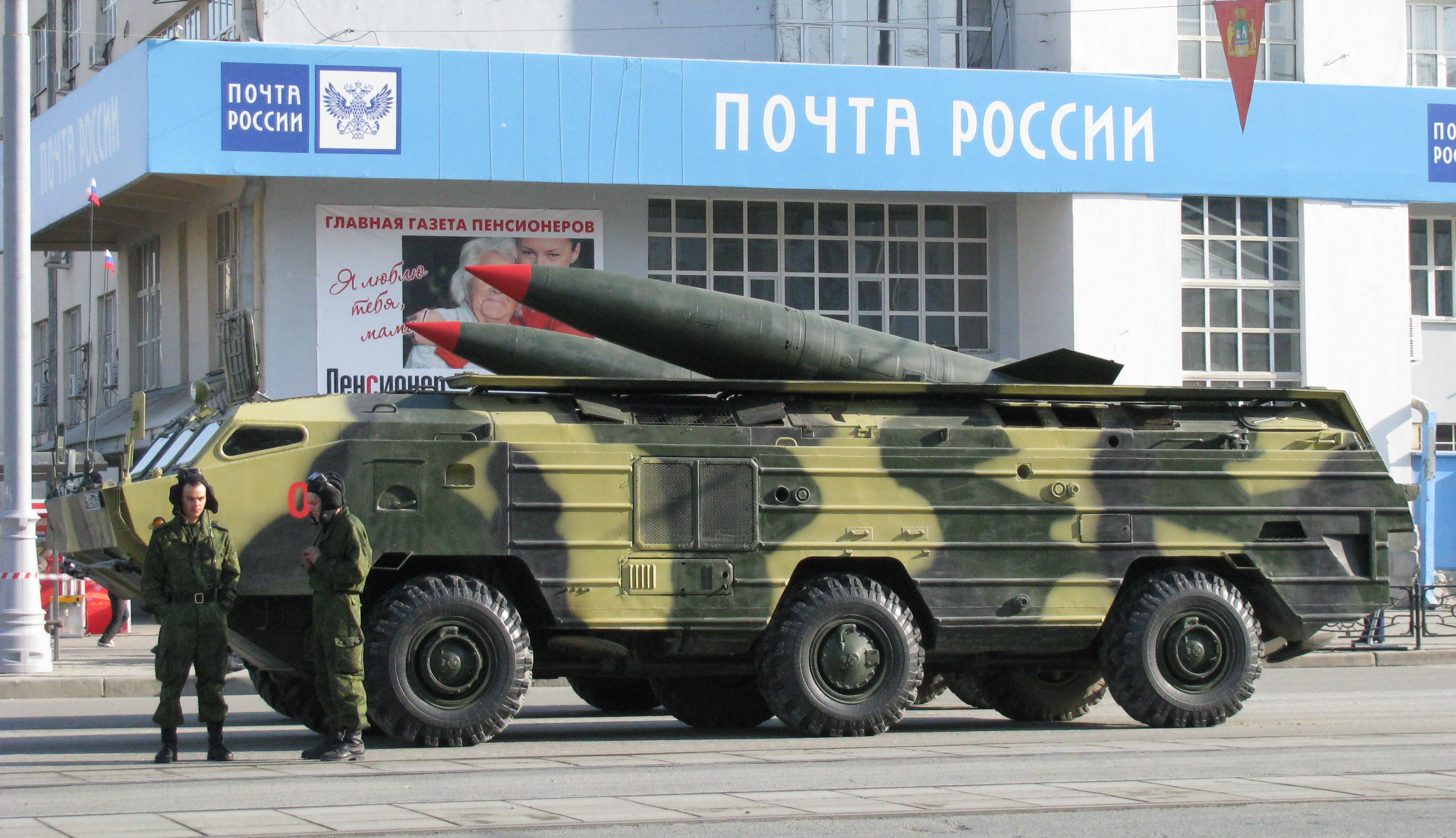 Точка-У перед парадом в Екатеринбурге